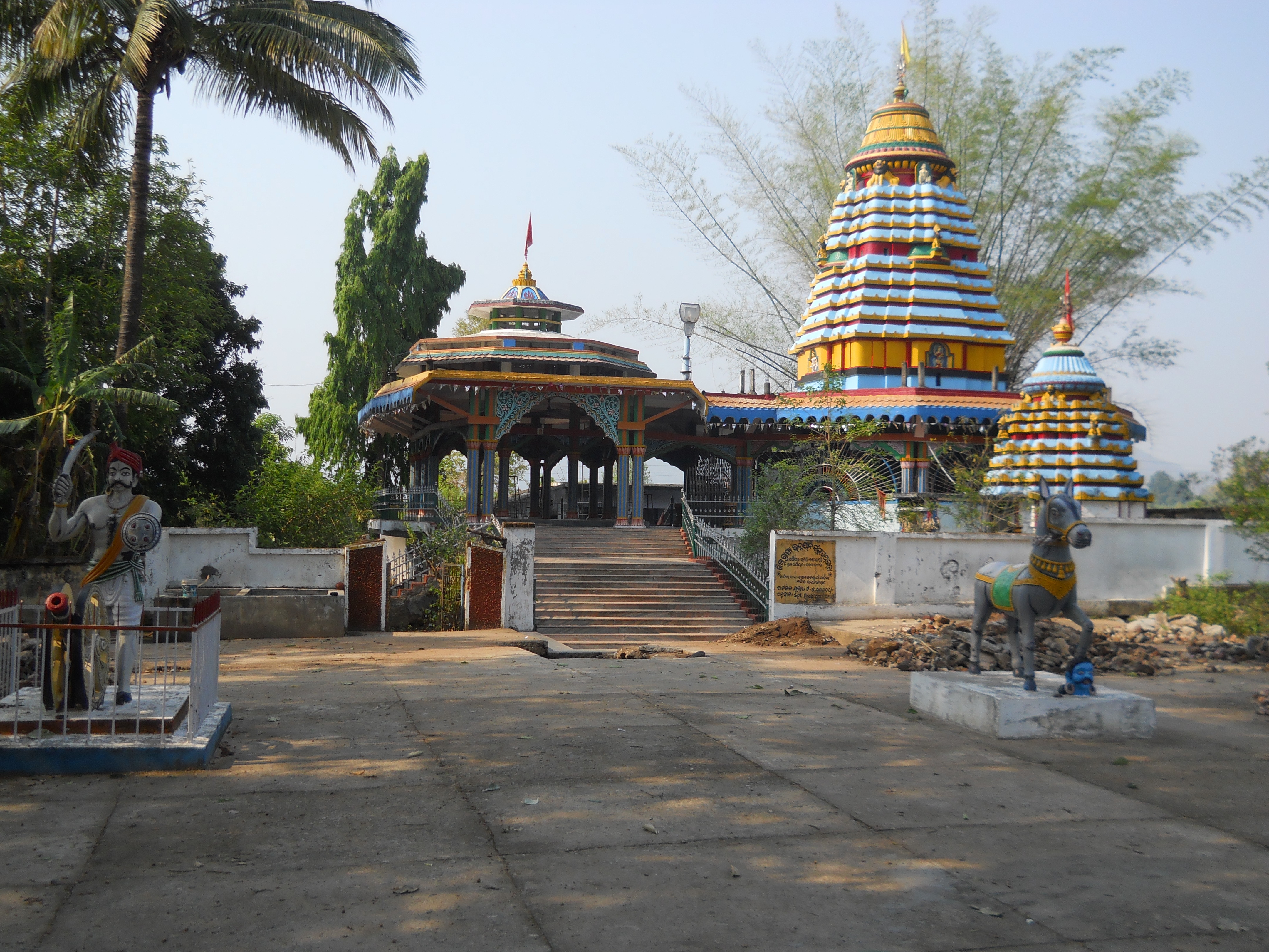 Maa Markama and Maa Karkama temple at Bissam Cuttack,Dist:Rayagada